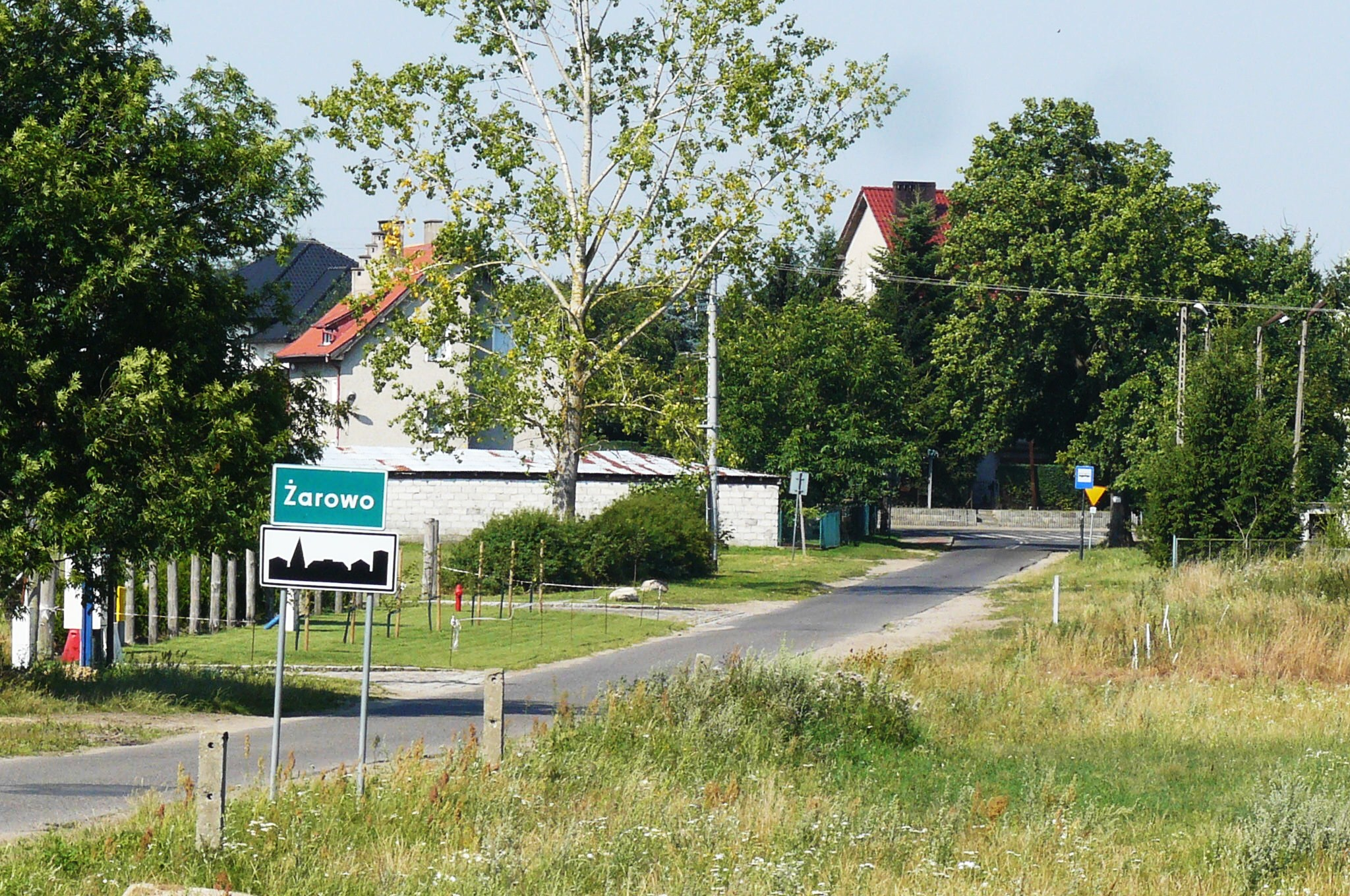 Żarowo, zachpom.